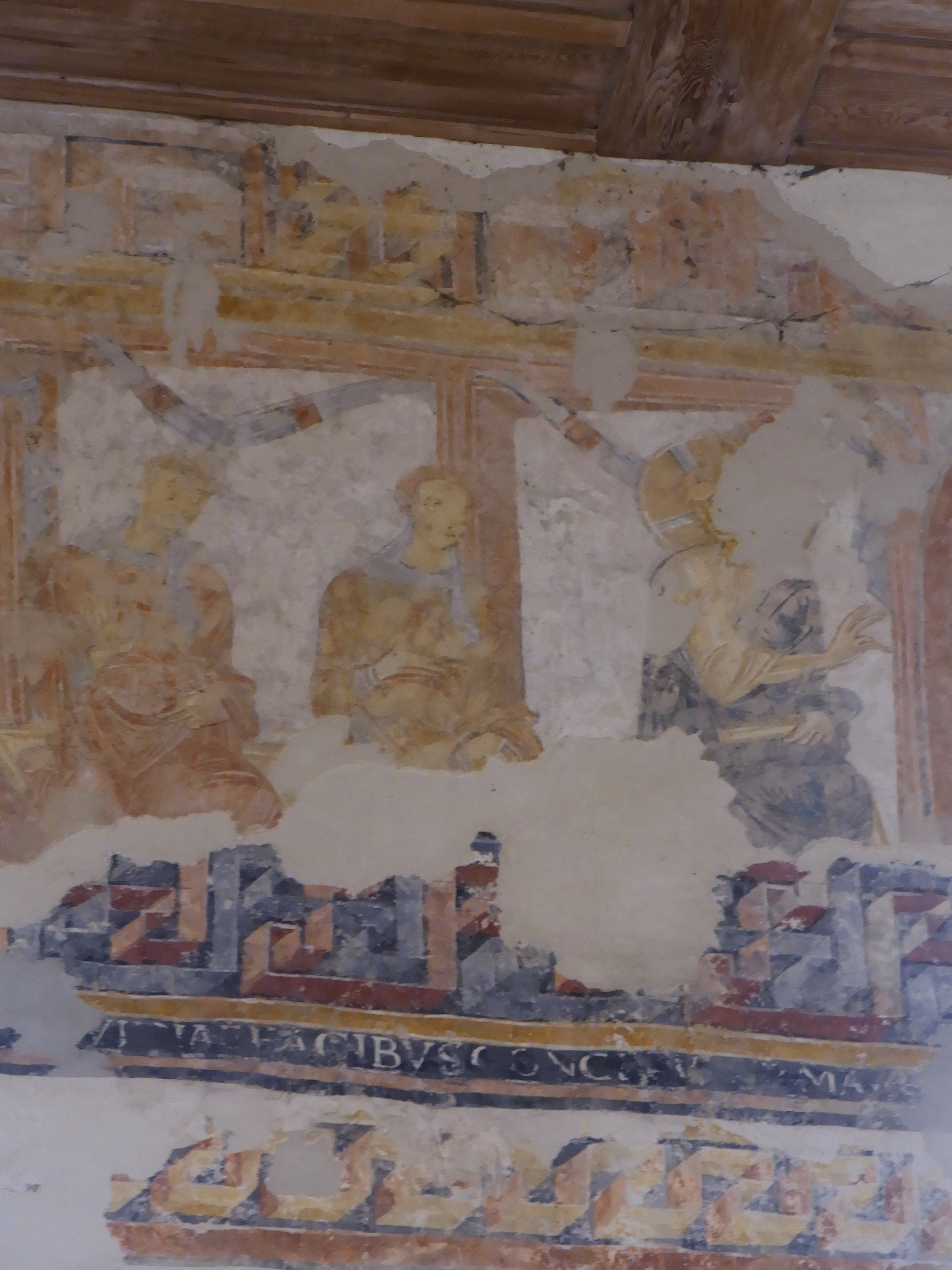 Sylvesterkapelle (Goldbach)